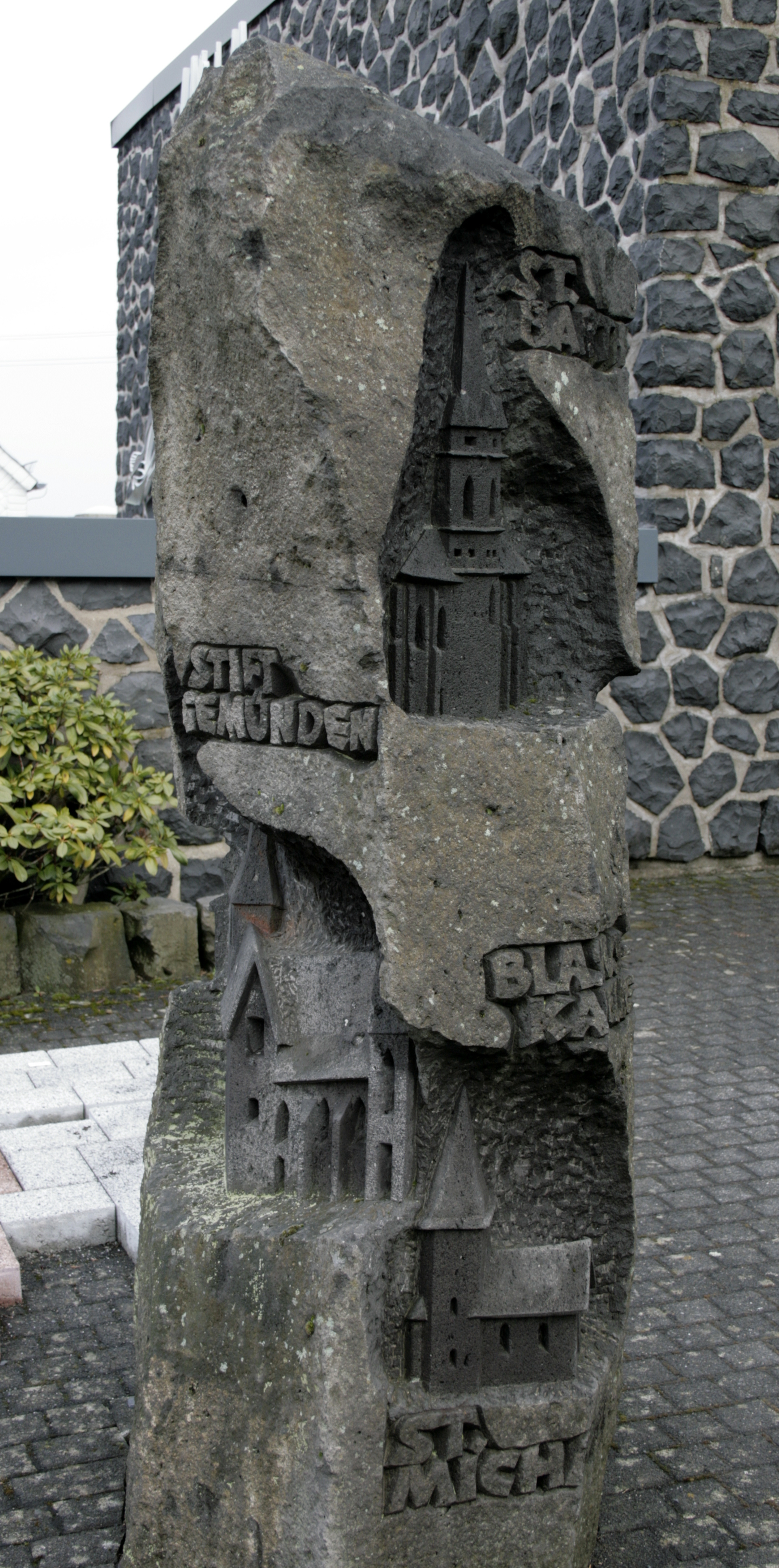 Gedenkstein an der Kirche in Wilsenroth, Deutschland